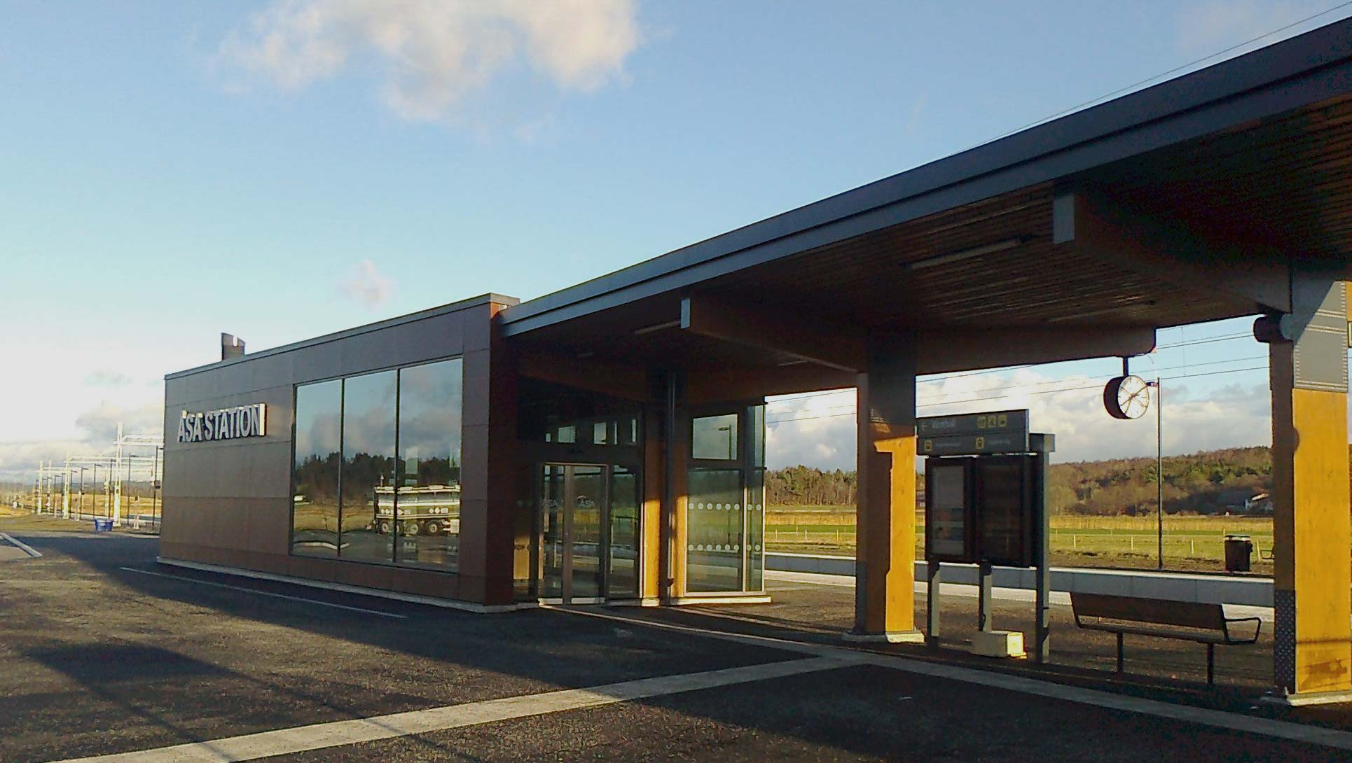 Åsa station, Kungsbacka kommun. Invigdes i december 2013.